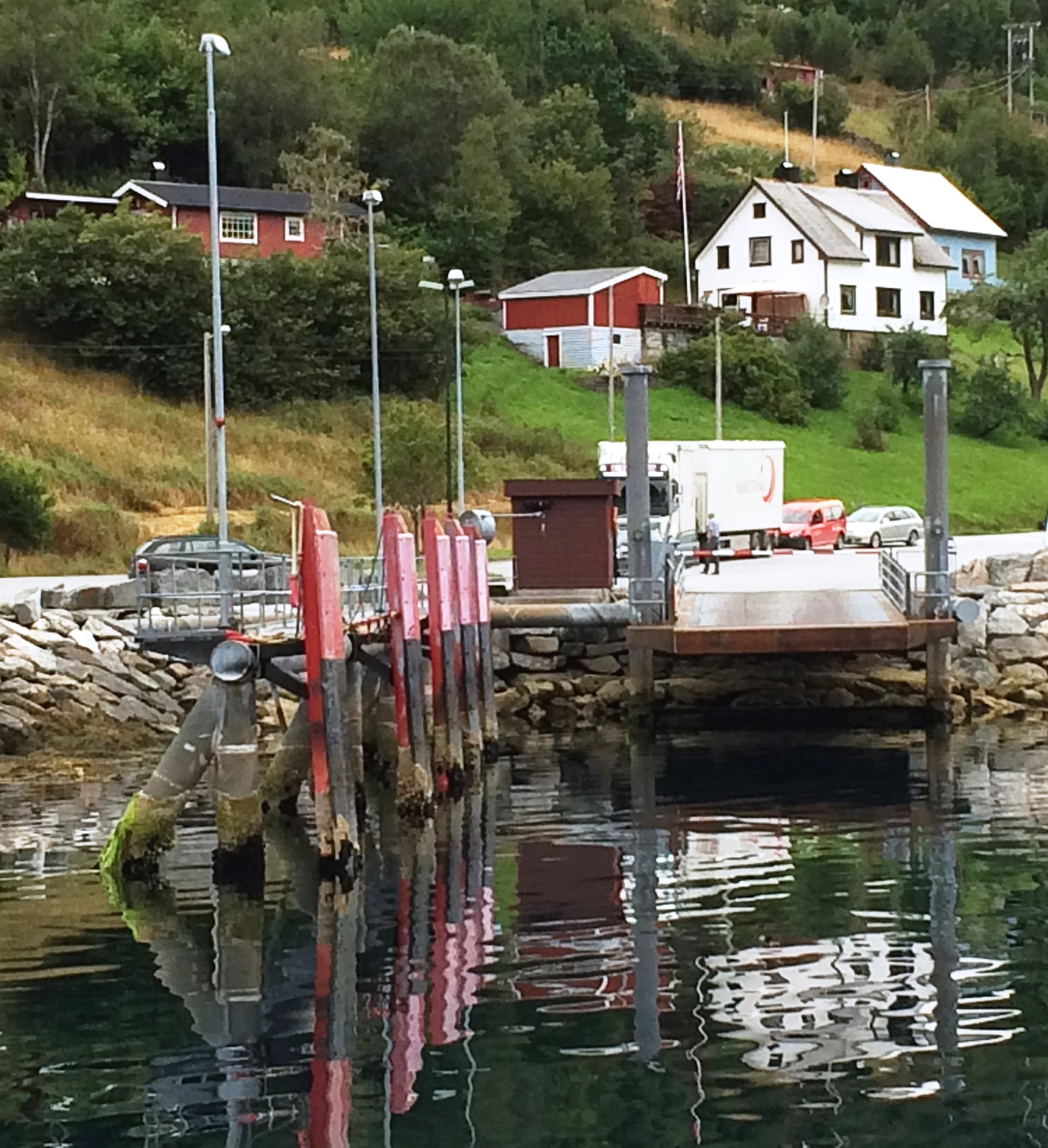 Leknes fergekai